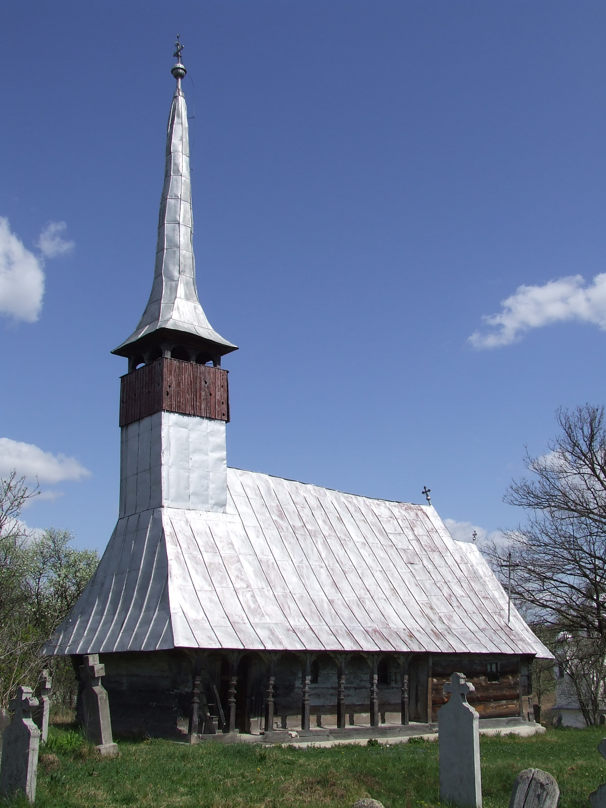 Biserica de lemn din Răstolţu Deşert, judeţul Sălaj.